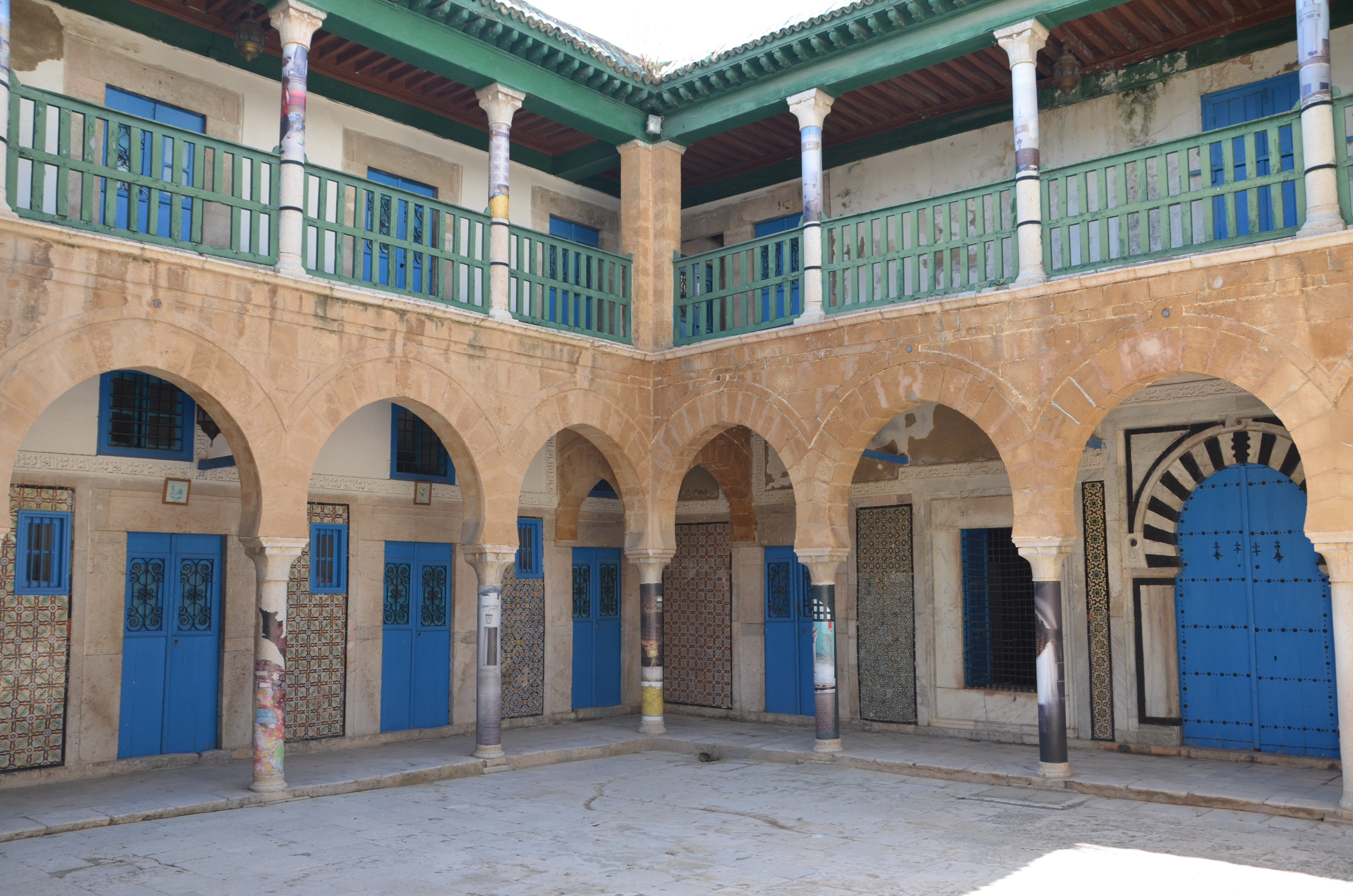 Medersa Mouradia, Tunis